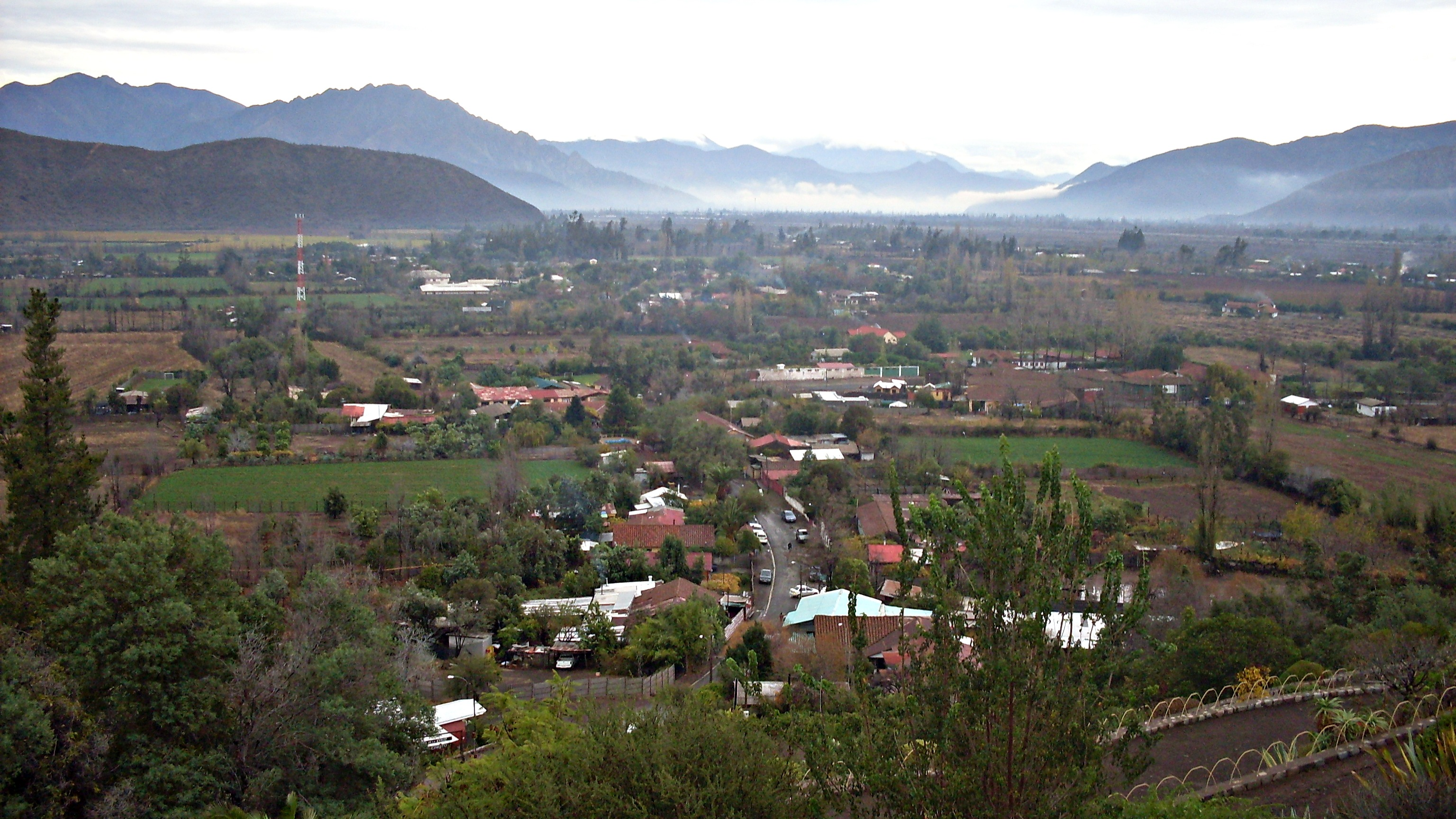 Rinconada de Silva, ubicada en la comuna de Putaendo, Provincia de San Felipe de Aconcagua, Región de Valparaíso, Chile. Vista desde el mirador del Santuario del Santo Cristo.